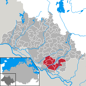 Former Amt Malliß in Mecklenburg-Vorpommern - district Ludwigslust